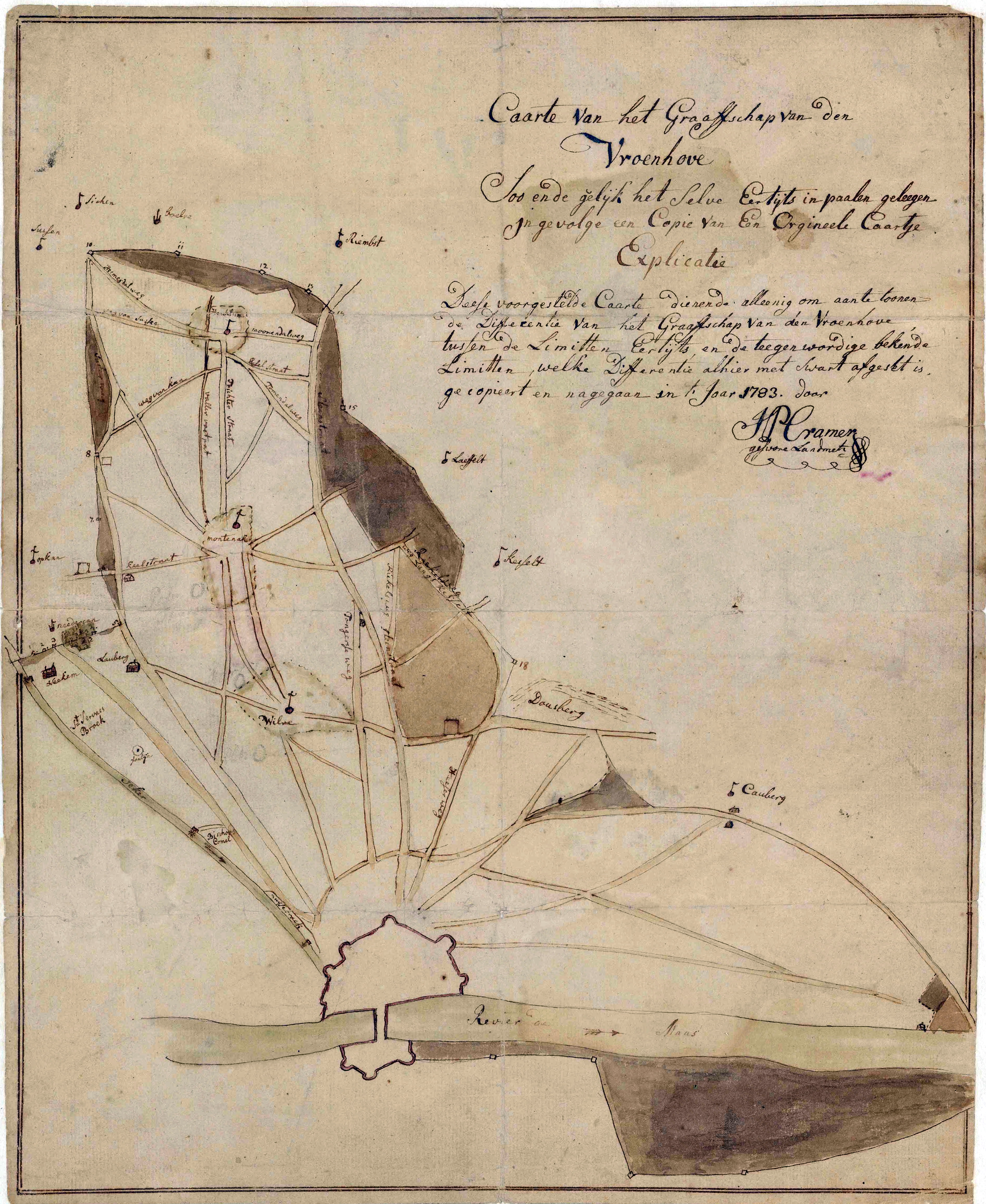 Kaart met de zogeheten "limieten" (grenzen) van de Vroenhof, opgemeten door de landmeter J.P. Cramer in 1783. Twaalf jaar later werd het Graafschap van de Vroenhof door de Fransen opgeheven en vormde daarna de gemeente Oud-Vroenhoven. Bijschrift: "Caarte van het graaffschap van de Vroenhove soo ende gelijk het selve Eertijts inpaalen geleegen ingevolge een Copie van een origineel Caartje. Deese voorgestelde Caarte dienende alleenig om aan te toonen de Differentie van het Graaffschap van den Vroenhove tussen de Limitten Eertijts, en de teegenwordige bekende Limitten, welke Differentie alhier met swart afgeset is, gecopieert en nagegaan in 't jaar 1783. - Door I.P. Cramer geswore Landmeter". Collectie RHCL Maastricht, RAL_K_047.